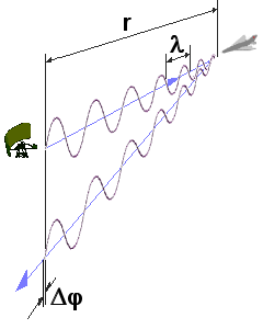 Entstehung einer Dopplerfrequenz bei einem Radargerät